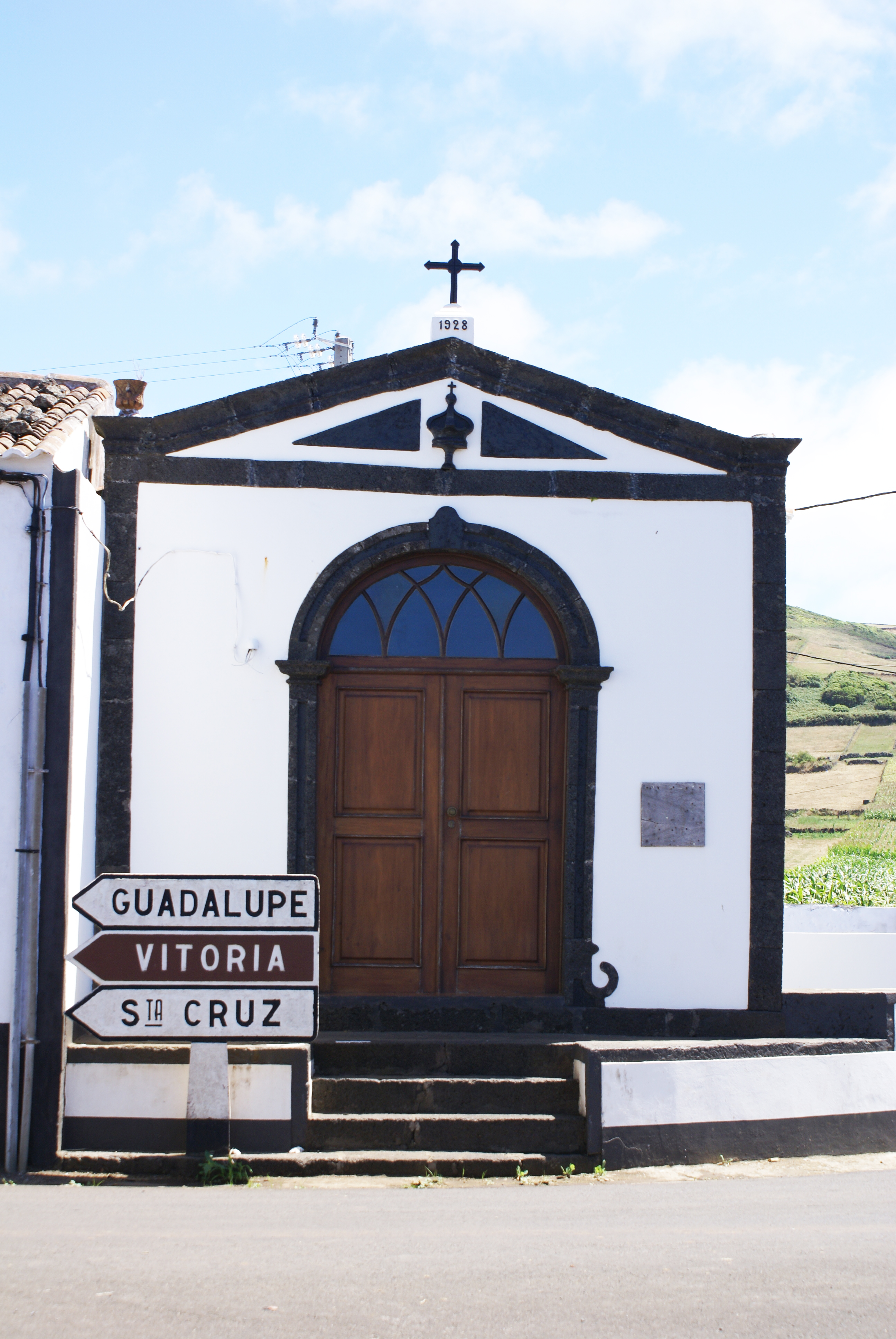 Império do Espírito Santo de Santo Amaro, Santa Cruz da Graciosa, ilha Graciosa, Açores, Portugal